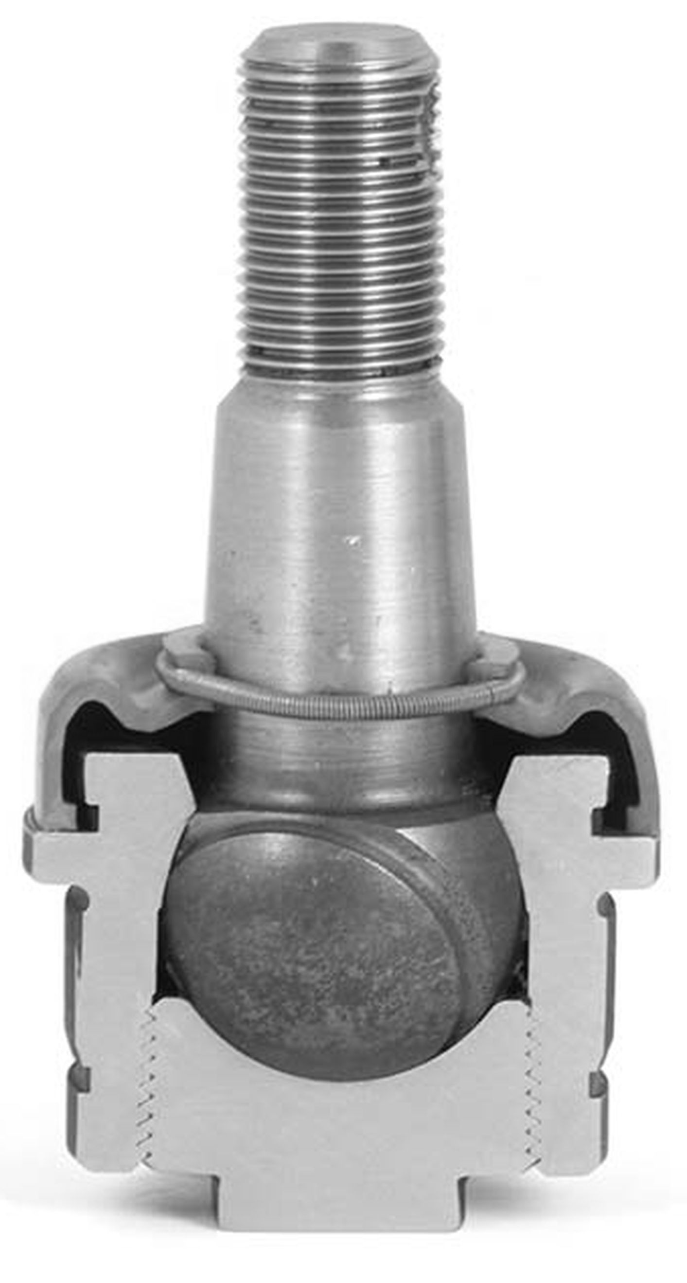 Kugelgelenk: Pfanne aufgeschnitten, Kugelkopf an einem Konus mit Gewindebolzen